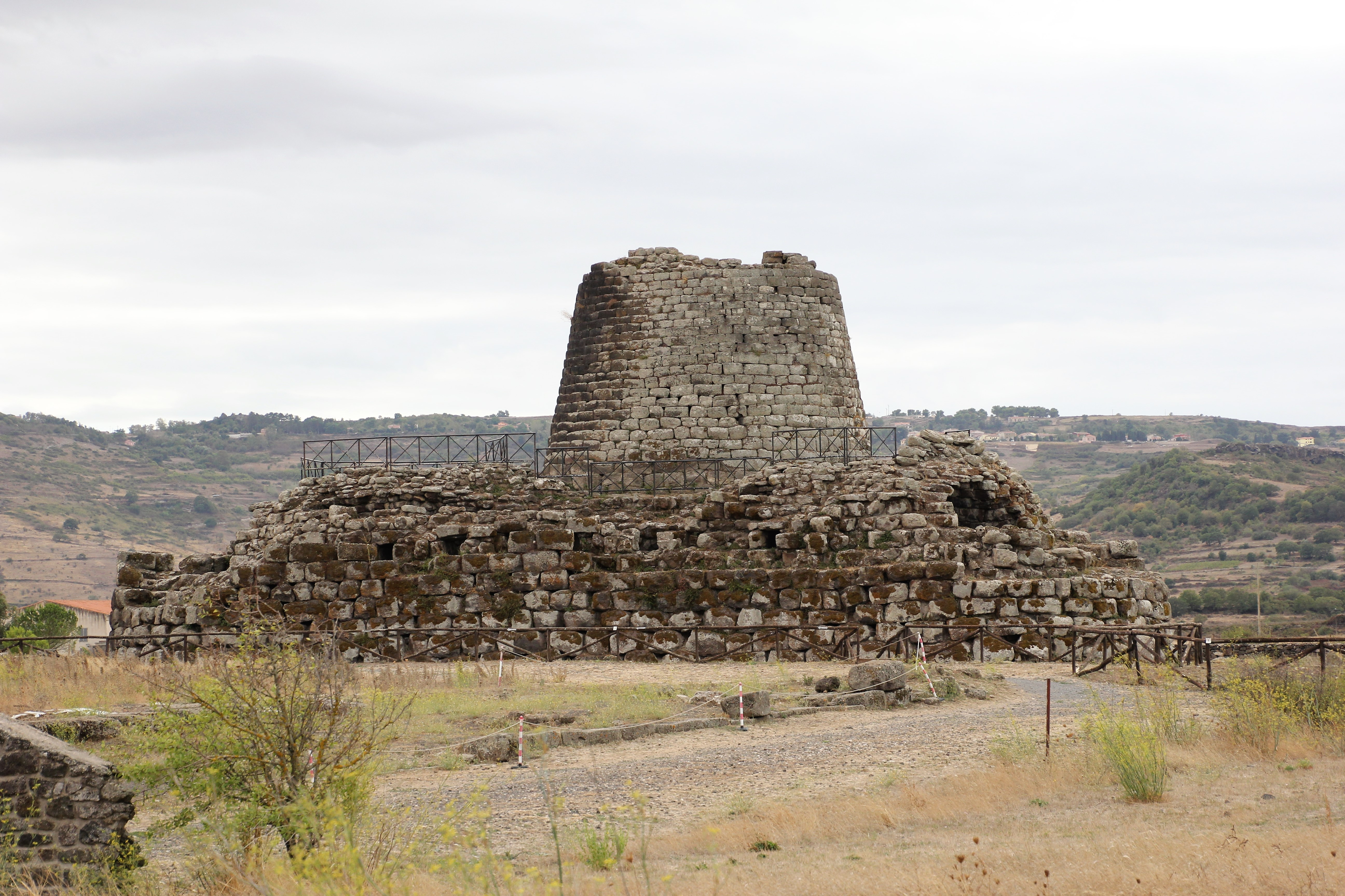 Torralba, nuraghe Santu Antine This is a photo of a monument which is part of cultural heritage of Italy.